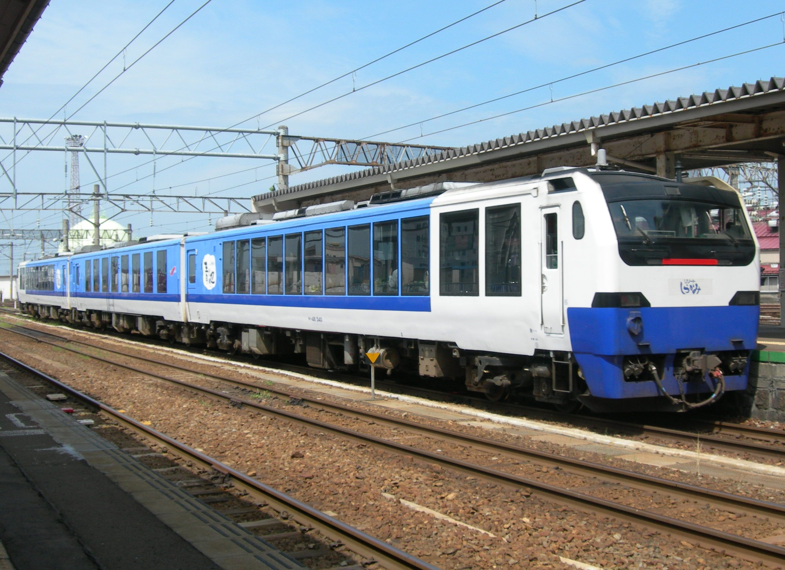 JR東日本キハ40系気動車リゾートしらかみ青池編成